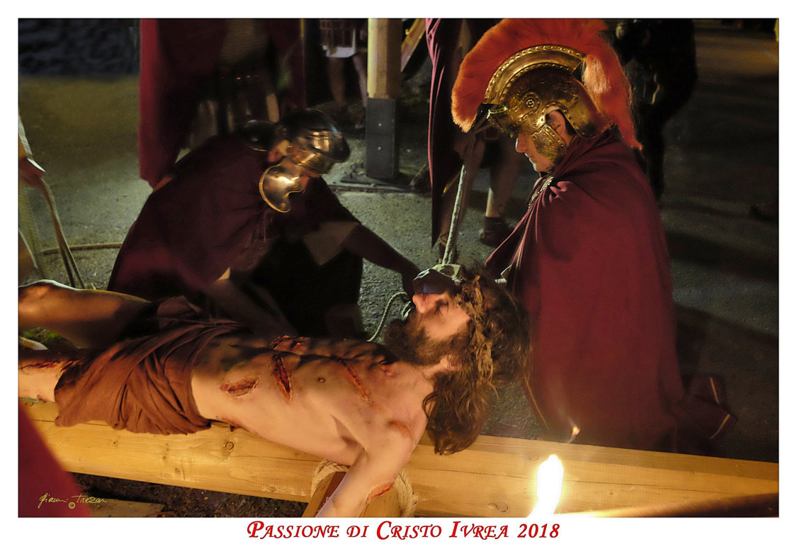 La Passione di Cristo di Ivrea - Crocefissione Sotto le Mura del Castello